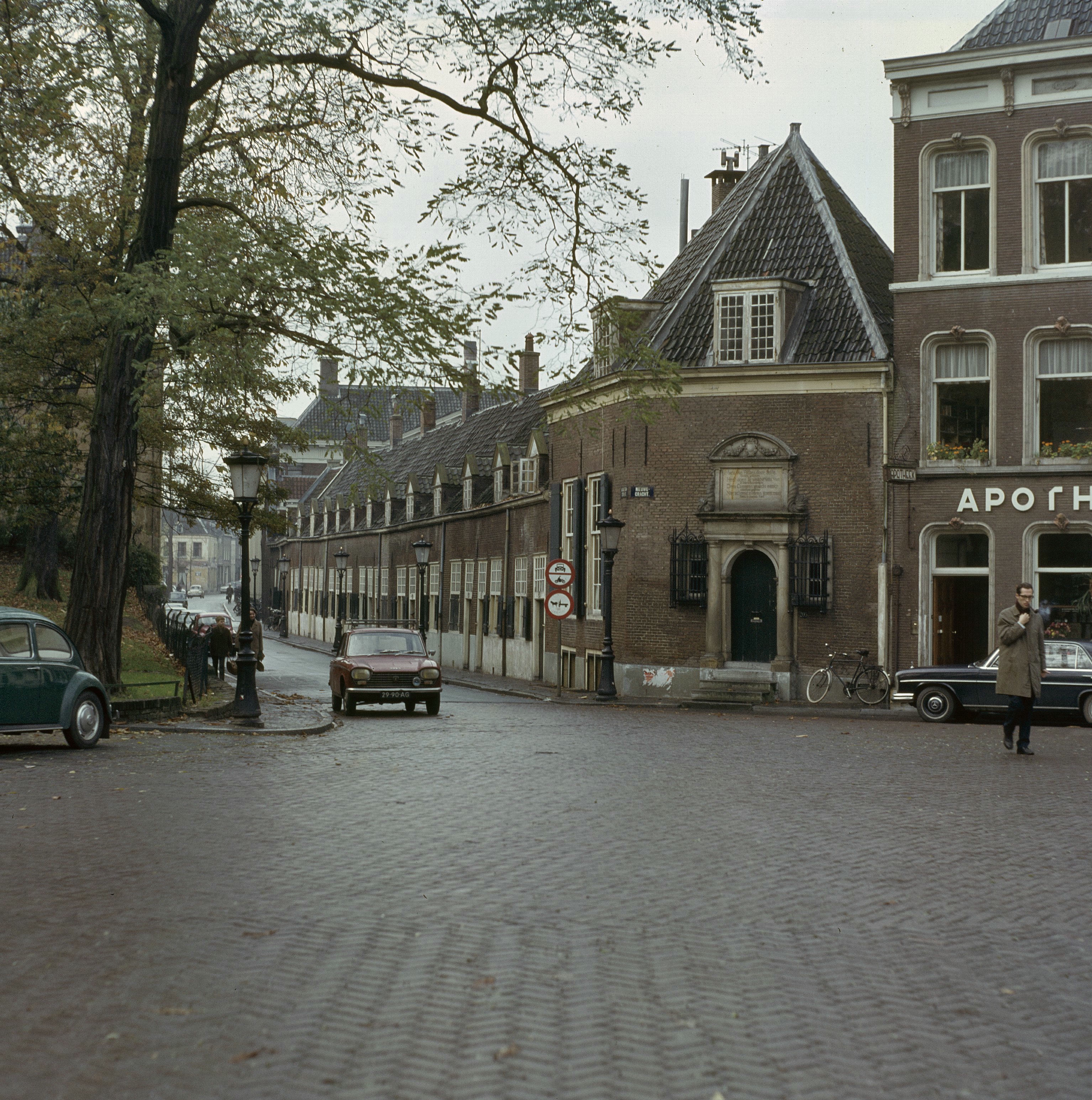 De Twaalf Kameren Van Maria Van Pallaes: Overzicht met op de hoek de refectiekamer ( eetzaal )